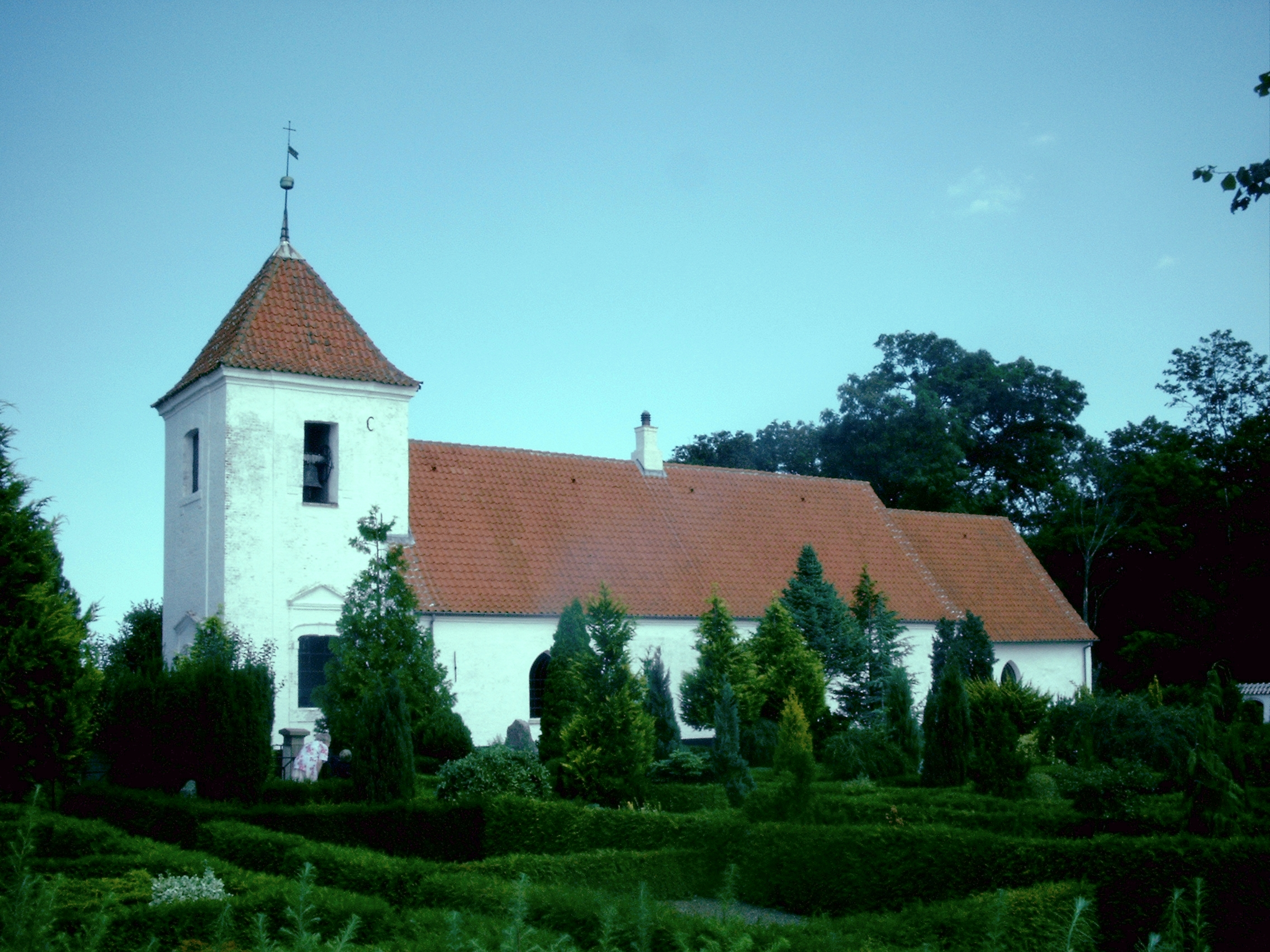 Uggerslev kirke, Uggerslev sogn, Otterup Kommune (former: Skam Herred, Odense Amt).